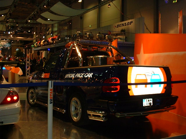 V8-Star Pace Car Essen Motorshow 2001